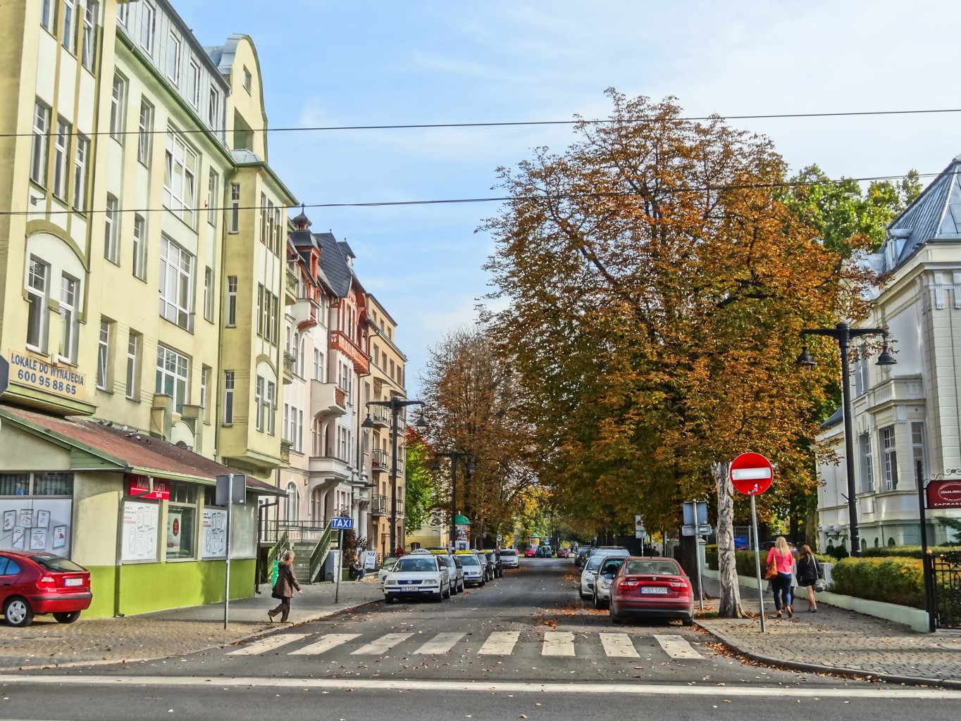 Ulica Juliusza Słowackiego w Bydgoszczy